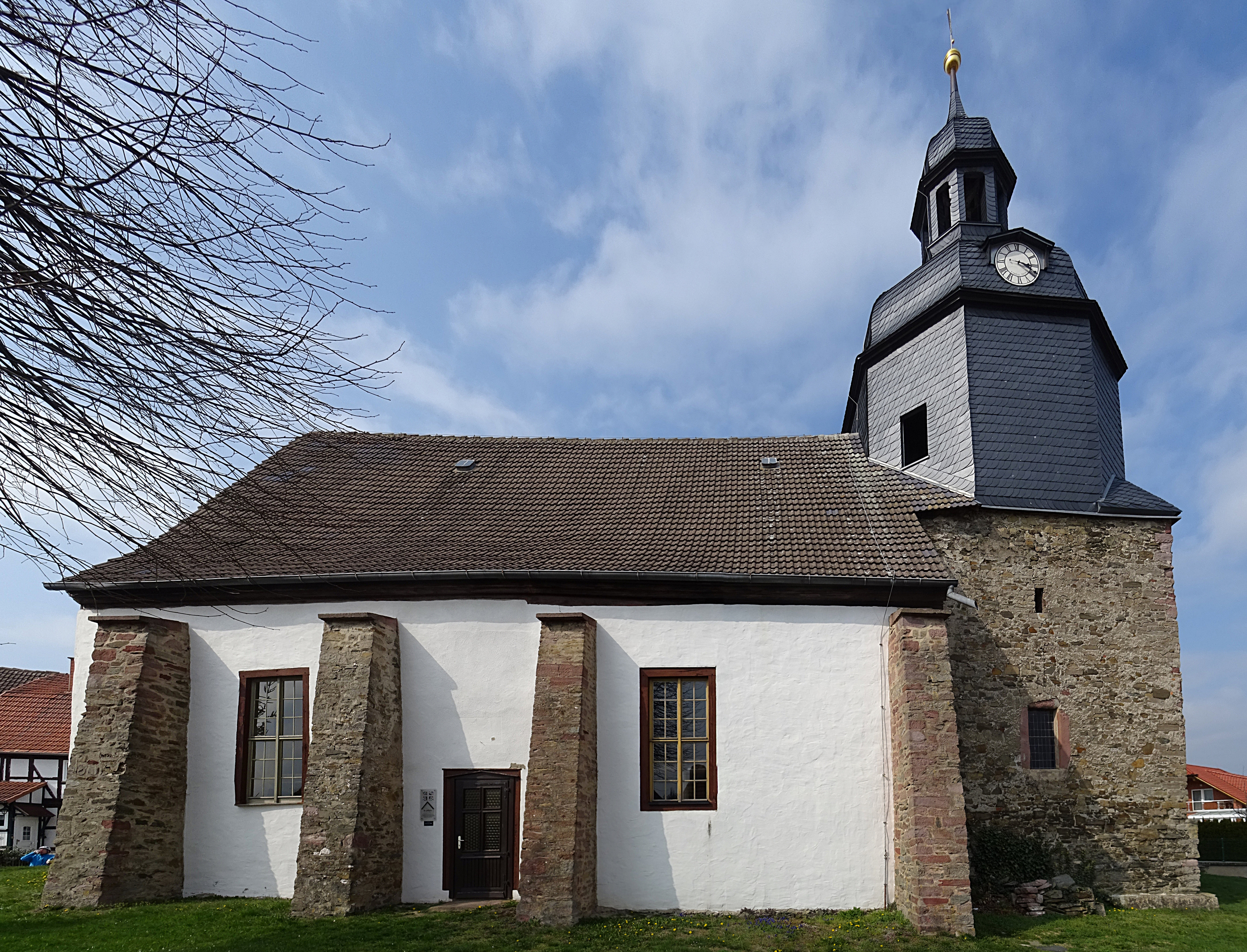 Dorfkirche St. Juliana in Rotha im Kirchenkreis St. Nicolai (Wolfsberg, Horla, Breitenbach, Rotha)